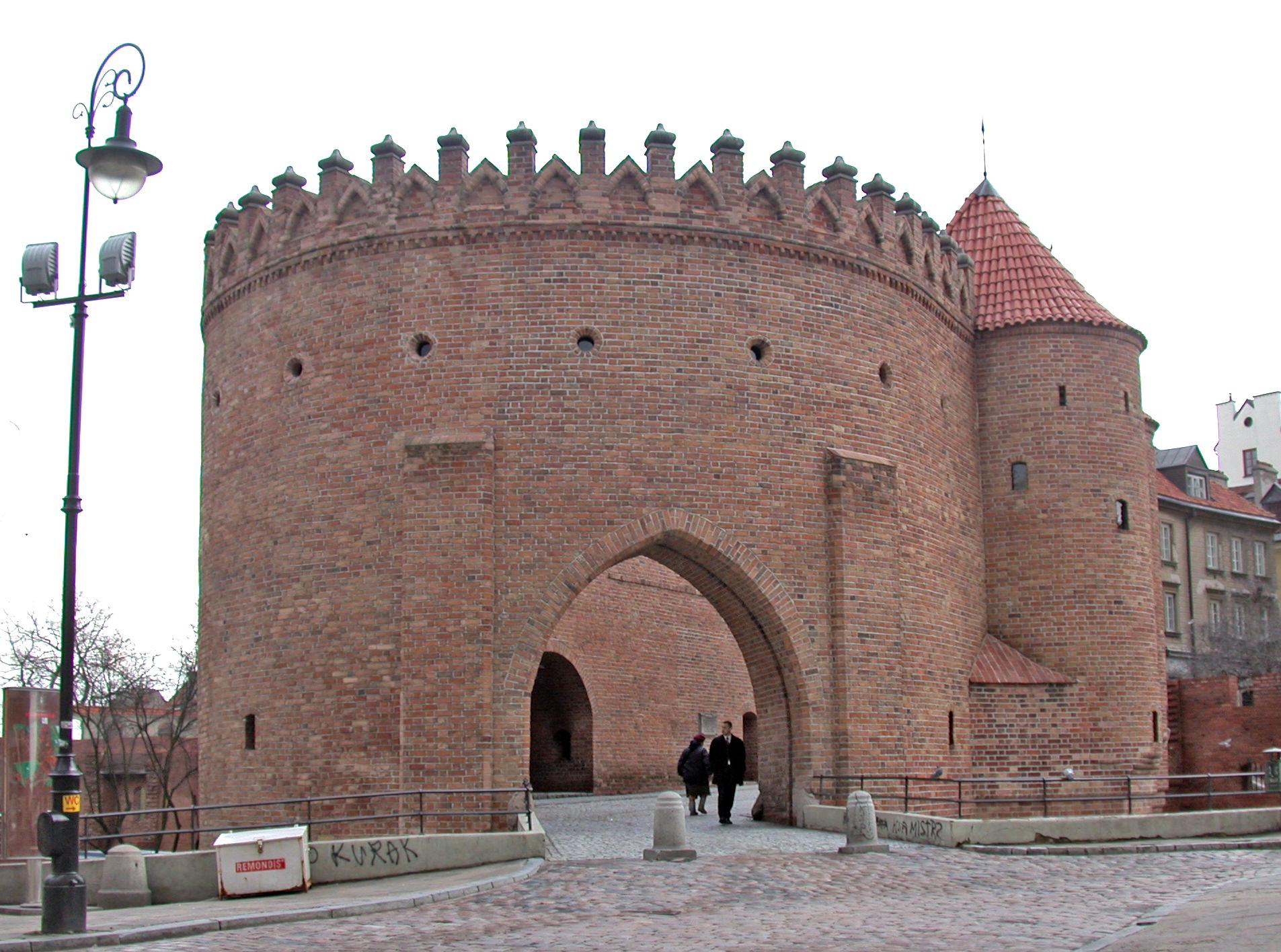 Varsavia, Barbacane (Barbakan), ingresso alla Città Vecchia (Stare Miasto), facciata esterna su via Nowomiejska.